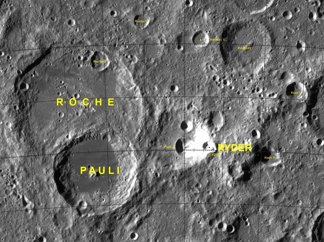 Cráter lunar Ryder. Localización. (Imagen LRO)